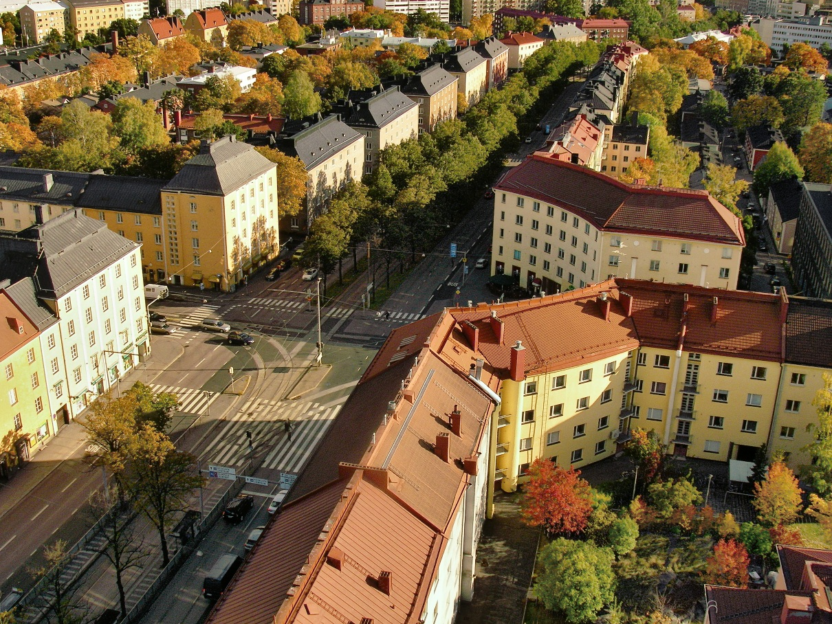 Sturenkadun ja Mäkelänkadun risteys Helsingin Vallilassa.